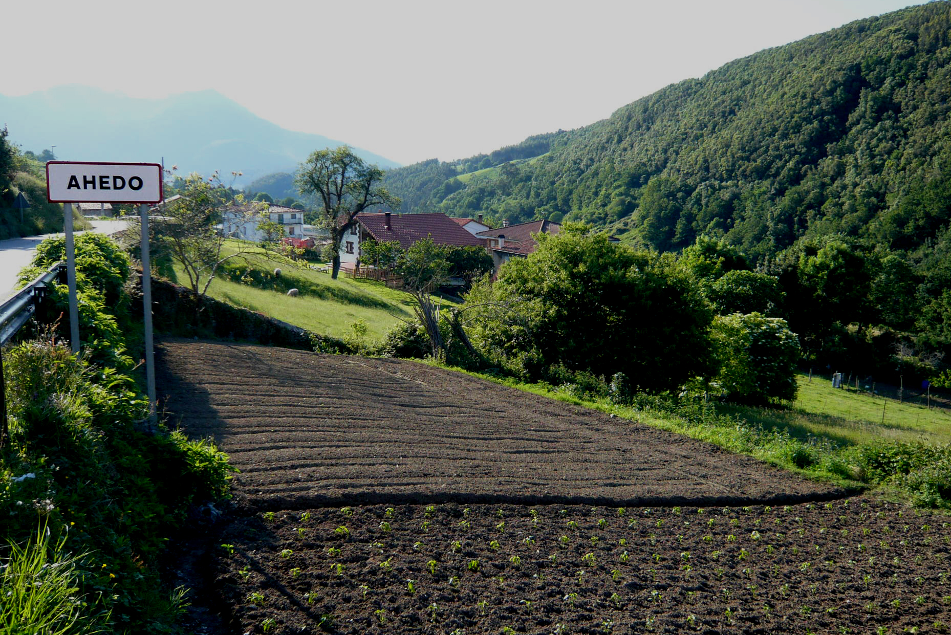 Vista parcial del casco urbano y alrededores, Ahedo, Ampuero, Cantabria, España